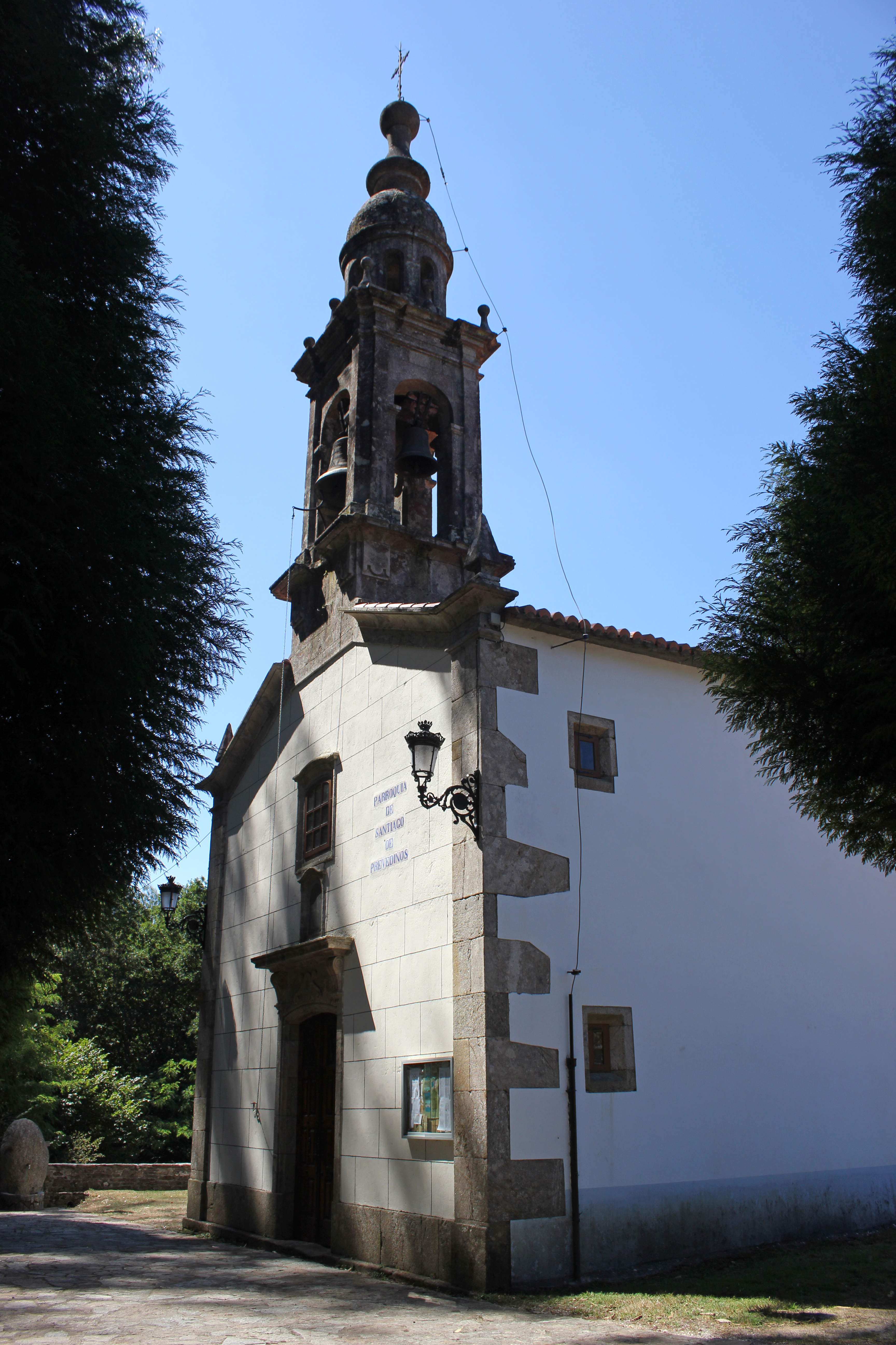 Igrexa de Prevediños no concello de Touro.